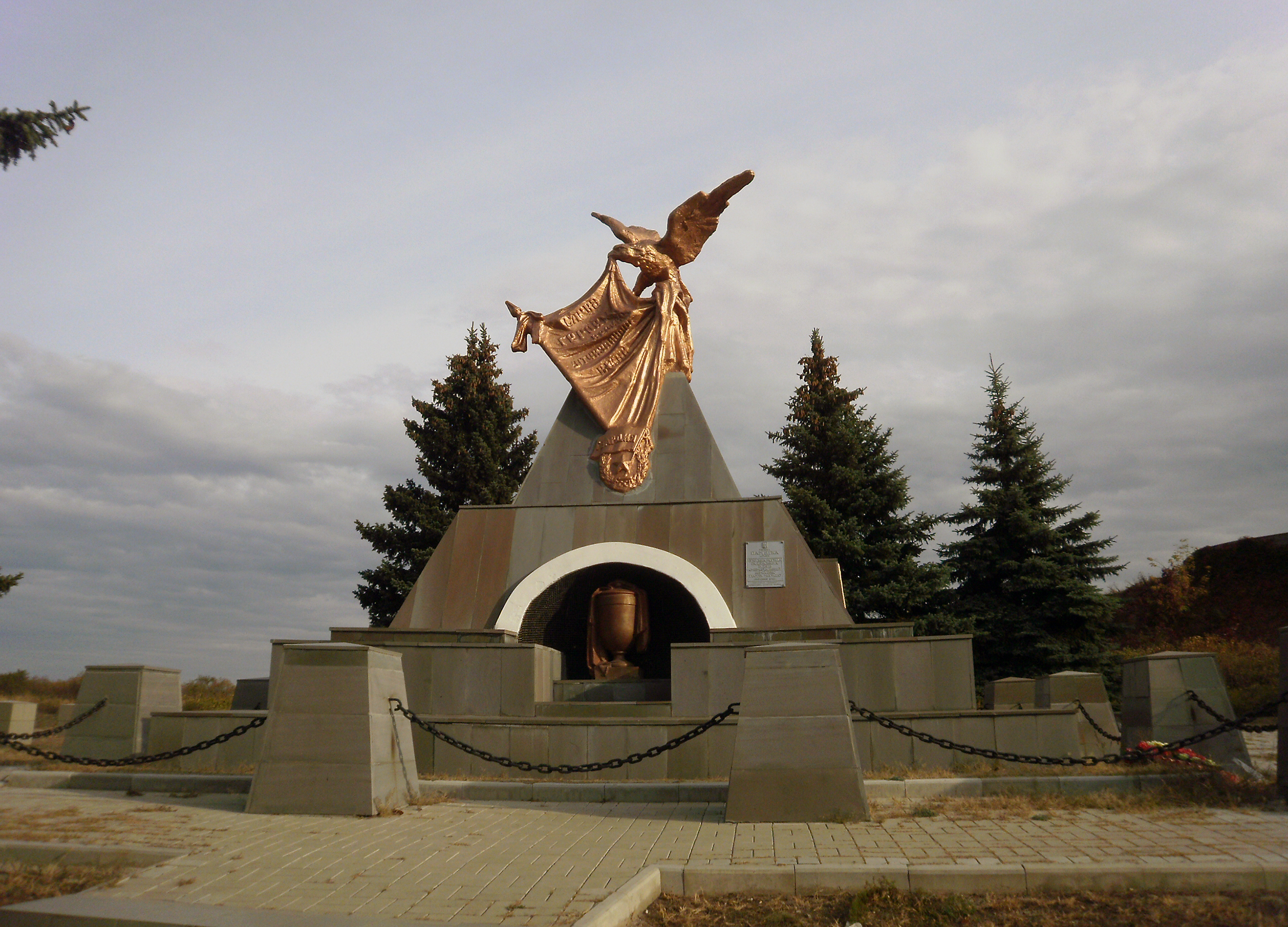 Острая могила, Луганск